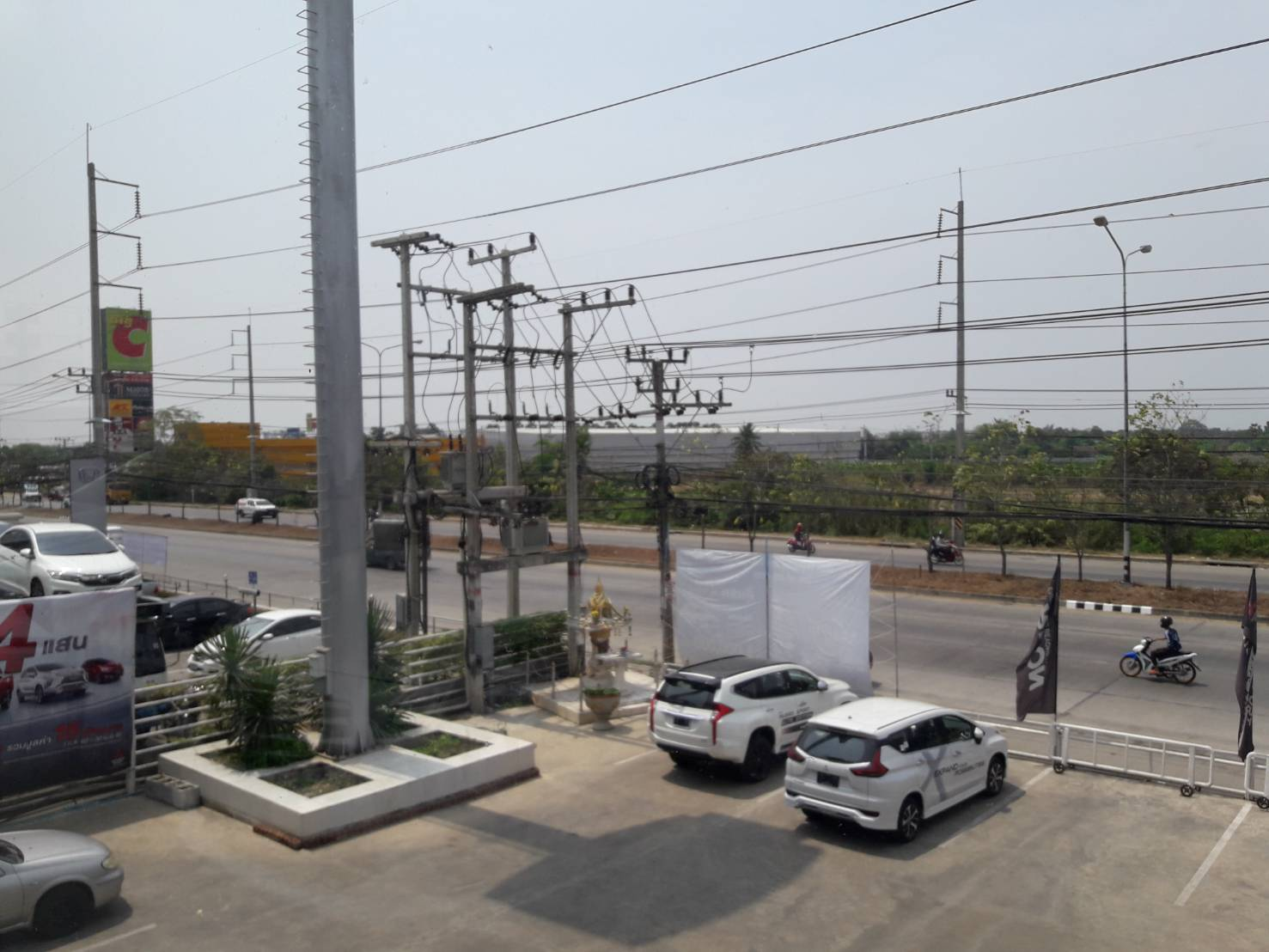 ทางหลวงแผ่นดินหมายเลข 307 บริเวณหน้าห้างสรรพสินค้าบิ๊กซี สาขาปทุมธานี